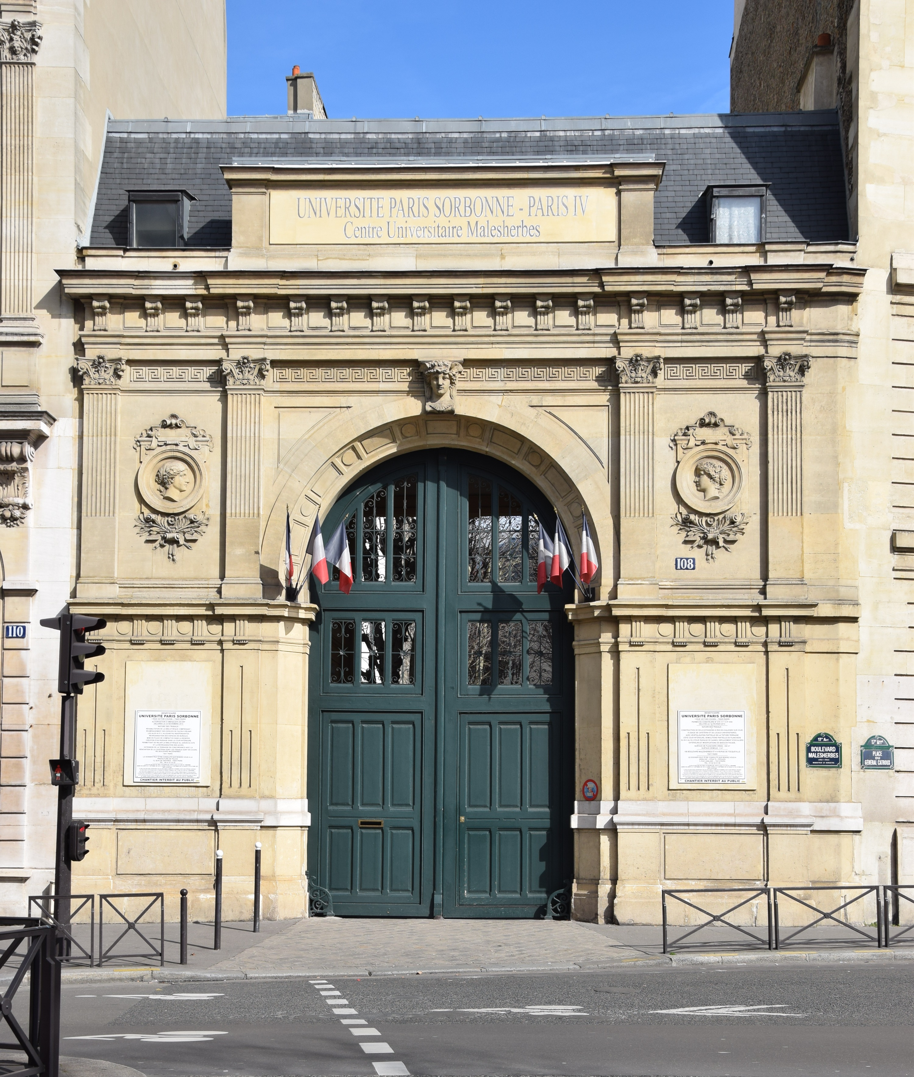 Centre Universitaire Malesherbes de l'université Paris-Sorbonne, anciennement Paris-IV. Ancien site de l'école des hautes études commerciales de Paris